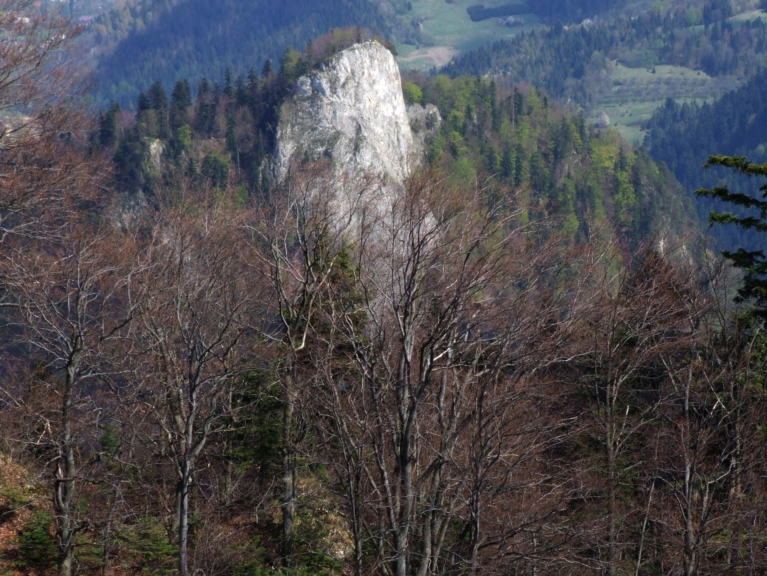 Sokolica, widok z Trzech Koron